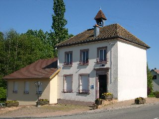 village de Cunelières (Territoire de Belfort) Photo prise en mai 2004 par LP90 Licence GFDL LP90 mai 2004